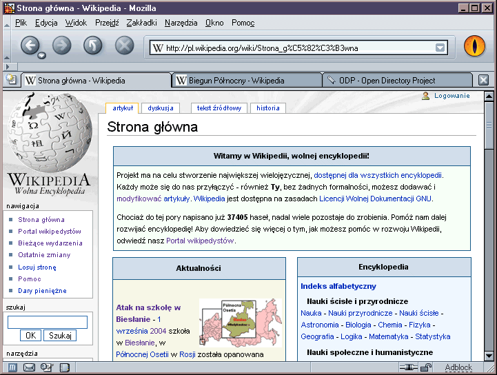 Screenshot MozilliPL, programu open source.